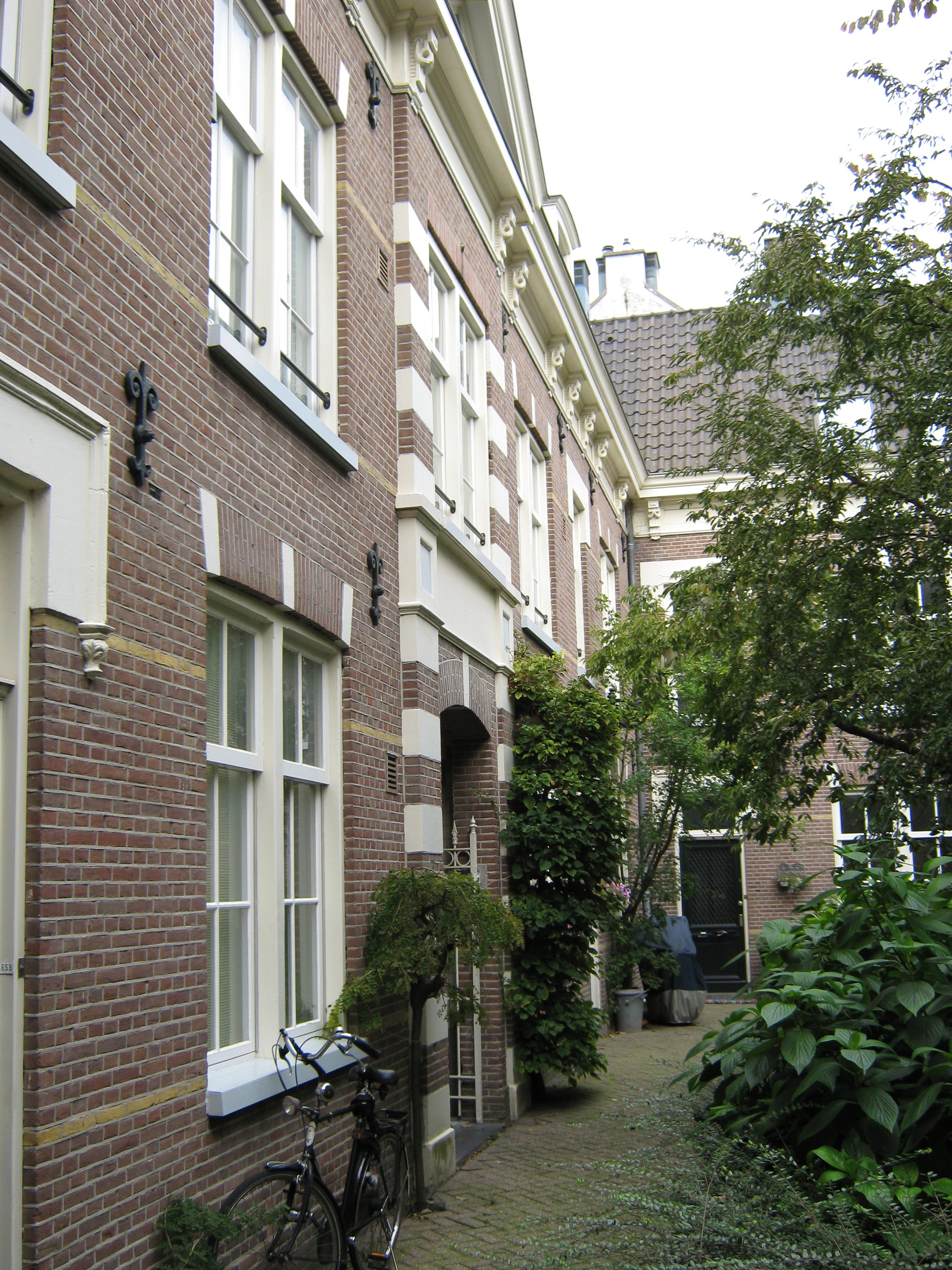 Amsterdam - Willemsstraat 149-165 (Constantiawoningen)